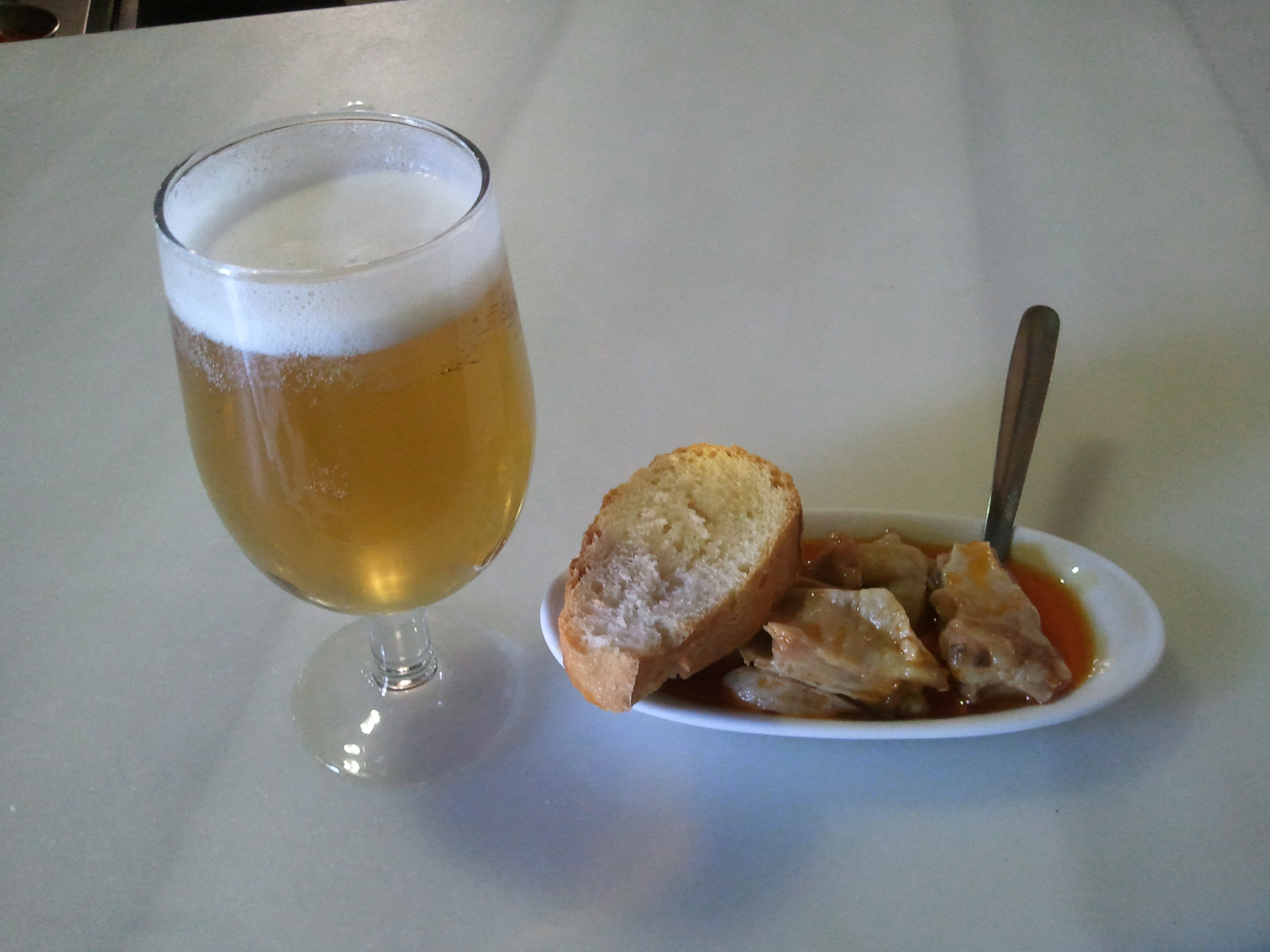 Pincho de caldereta,Bar el Rastro, Ávila, España.